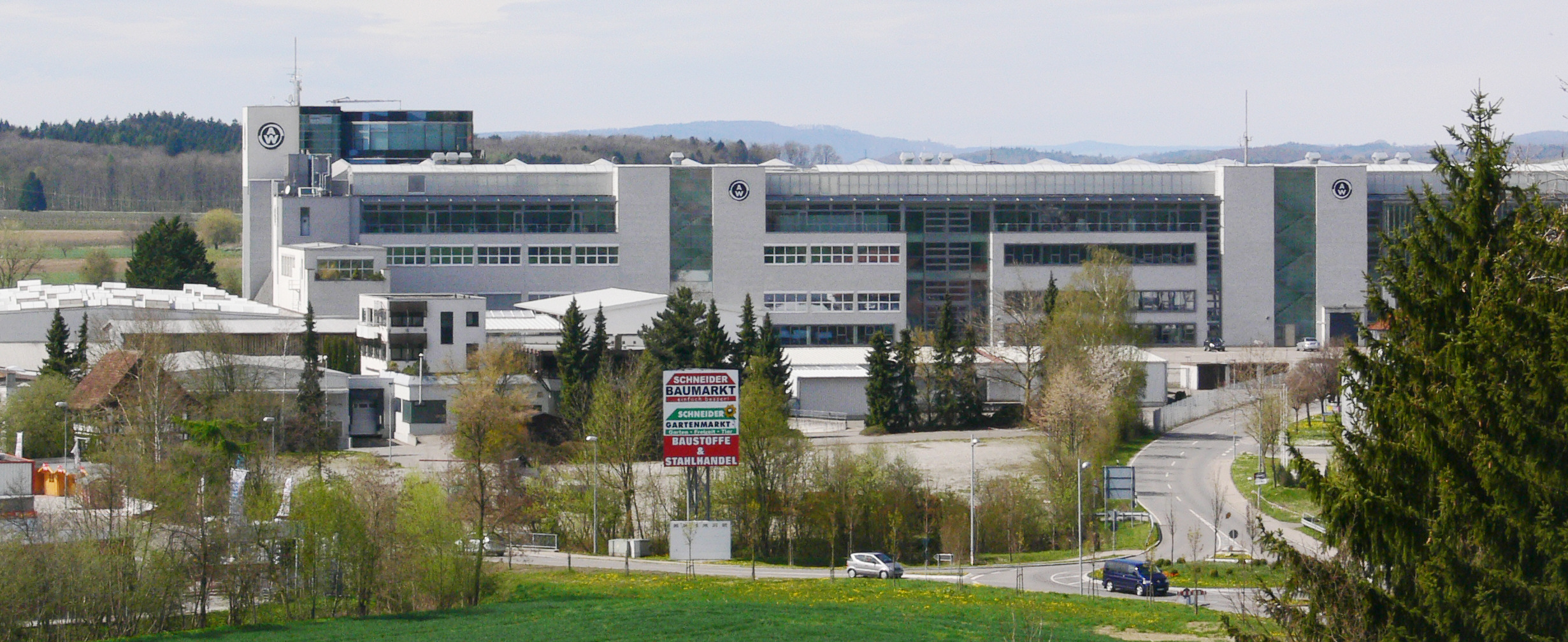 Weber Automotive in Markdorf, Bodenseekreis (gesehen von der Hochkreuzkapelle)